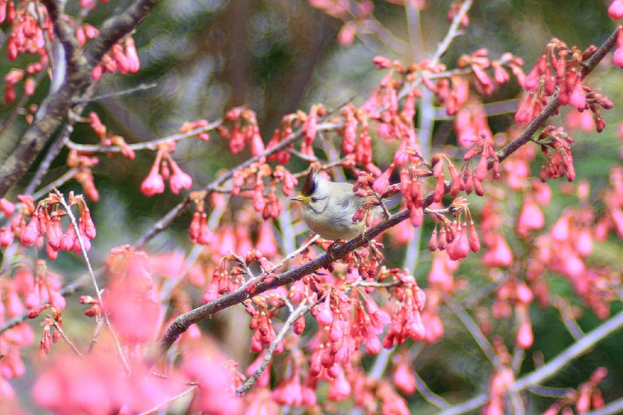 Formosan Yuhina (Yuhina brunneiceps)